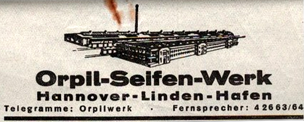 Briefkopf (Ausschnitt von einem undatierten Rechnungs-Abreissboten) vom Orpil-Seifen-Werk in „Hannover-Linden-Hafen“ mit einer mutmaßlich in den 1920er Jahren hergestellten Vogelschau über das Werksgelände mit zwei Gleisanschlüssen für die Eisenbahn und hohem Fabrikschlot über den Gebäuden ...